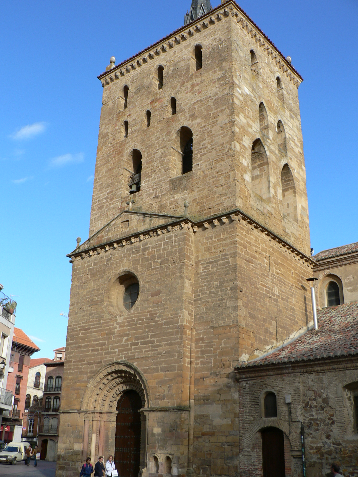 Iglesia de Santa Maria de Azoague. Benavente (Zamora) --Achica 02:04 2 jun, 2005 (CEST) Simple y llanamente hecha con mi cámara. Retirada de Benavente